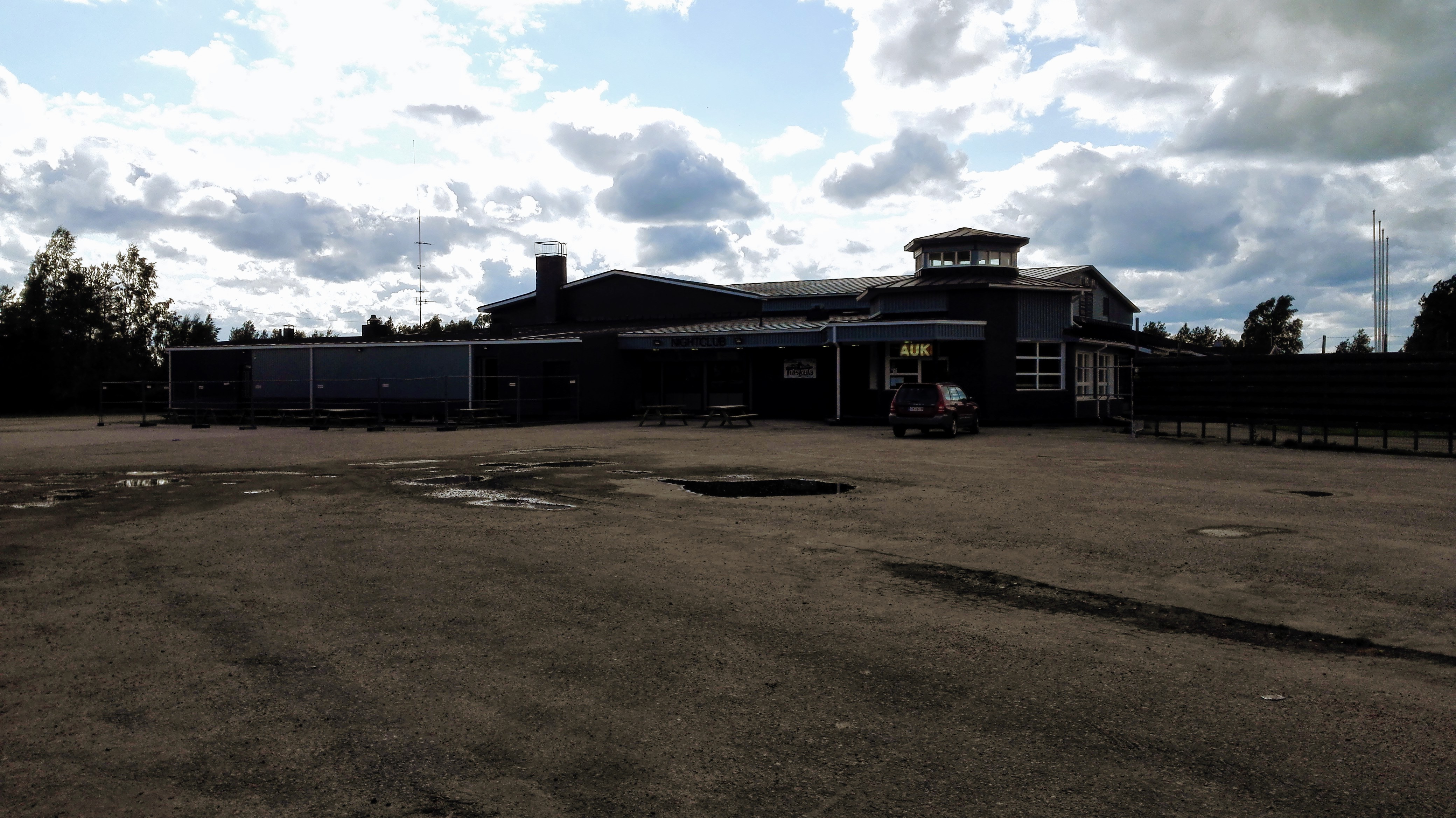 Viihdekeskus Tuiskula elokuussa 2017.